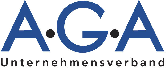 Das Logo des AGA Unternehmensverbandes von 2001